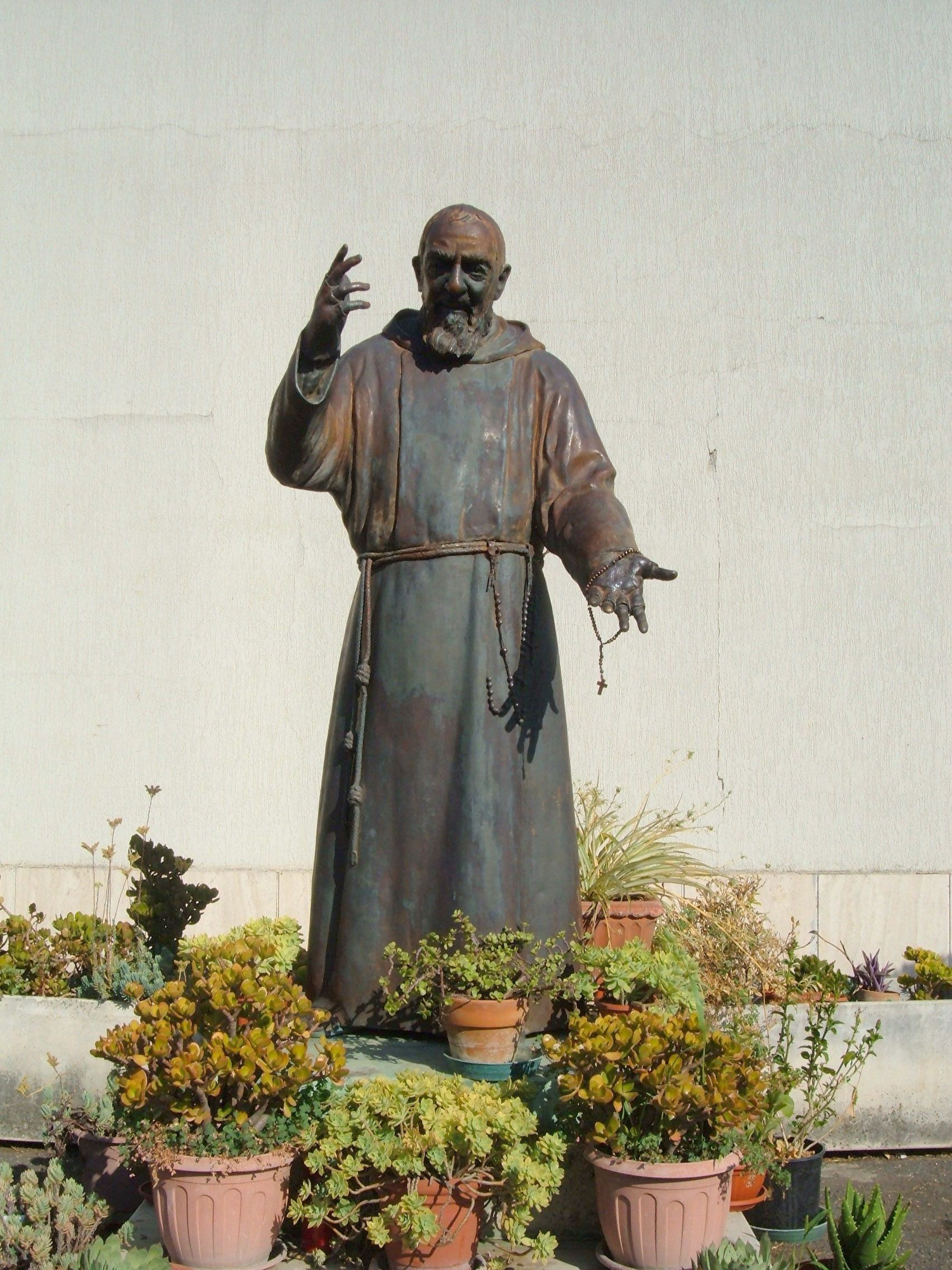 Chiesa di San Stanislao, a Roma, nel quartiere Don Bosco. Statua di Padre Pio da Pietrelcina.